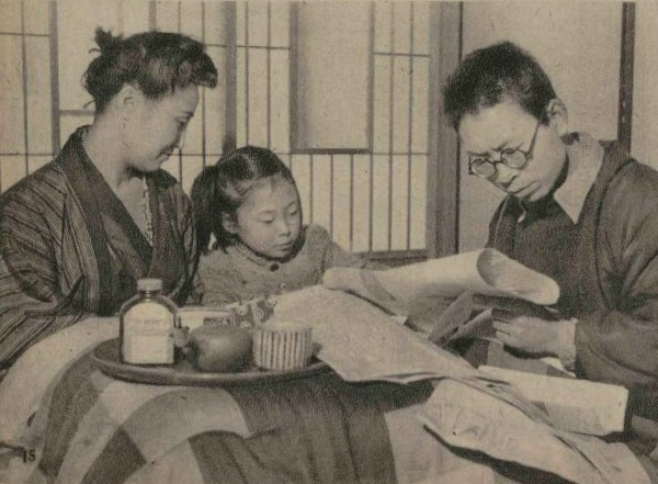 中野重治・原泉夫妻 中央は娘の卯女